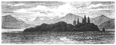 Roseninsel, Holzstich, 4,5 x 11 cm